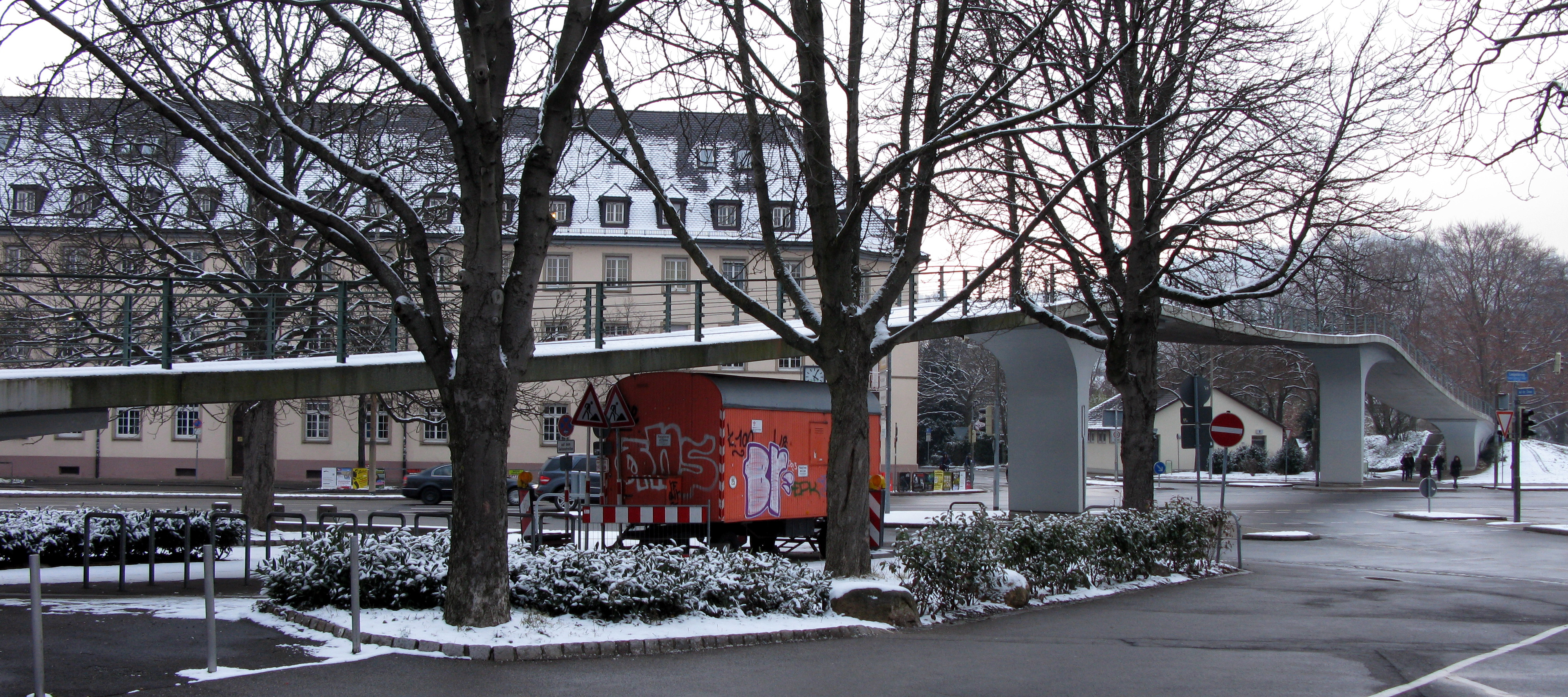 Karlssteg vom Karlsplatz aus gesehen